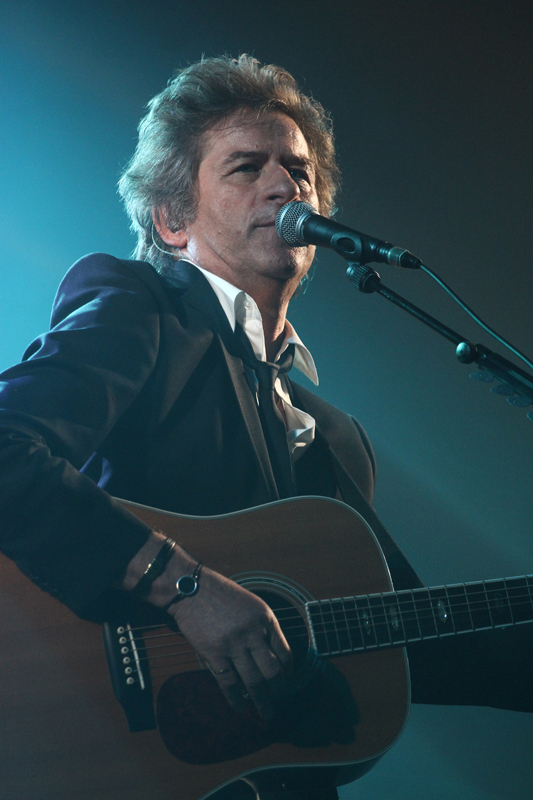 Concert dans le cadre du 24° Festival Chorus des Hauts de Seine à Gennevilliers